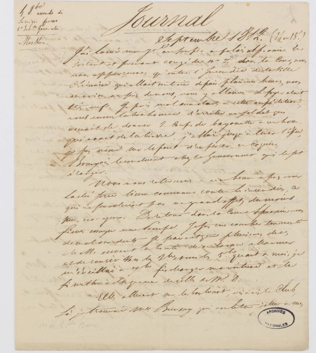 Lettre de Stendhal à sa sœur, Pauline Périer, datée de Moscou, 4 octobre 1812. Page 1